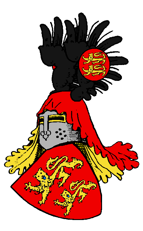 Stammwappen der Grafen von Diez.